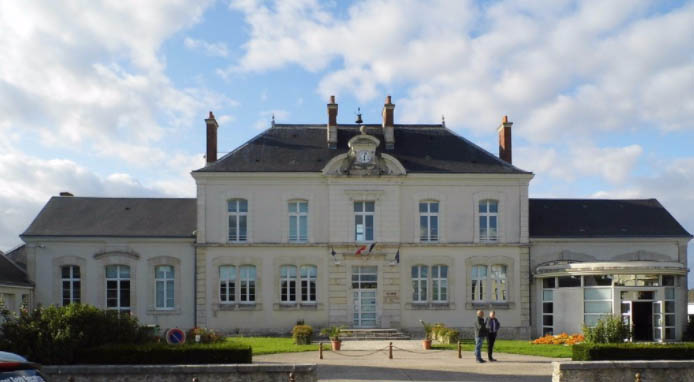 Mairie de Villebarou (41)